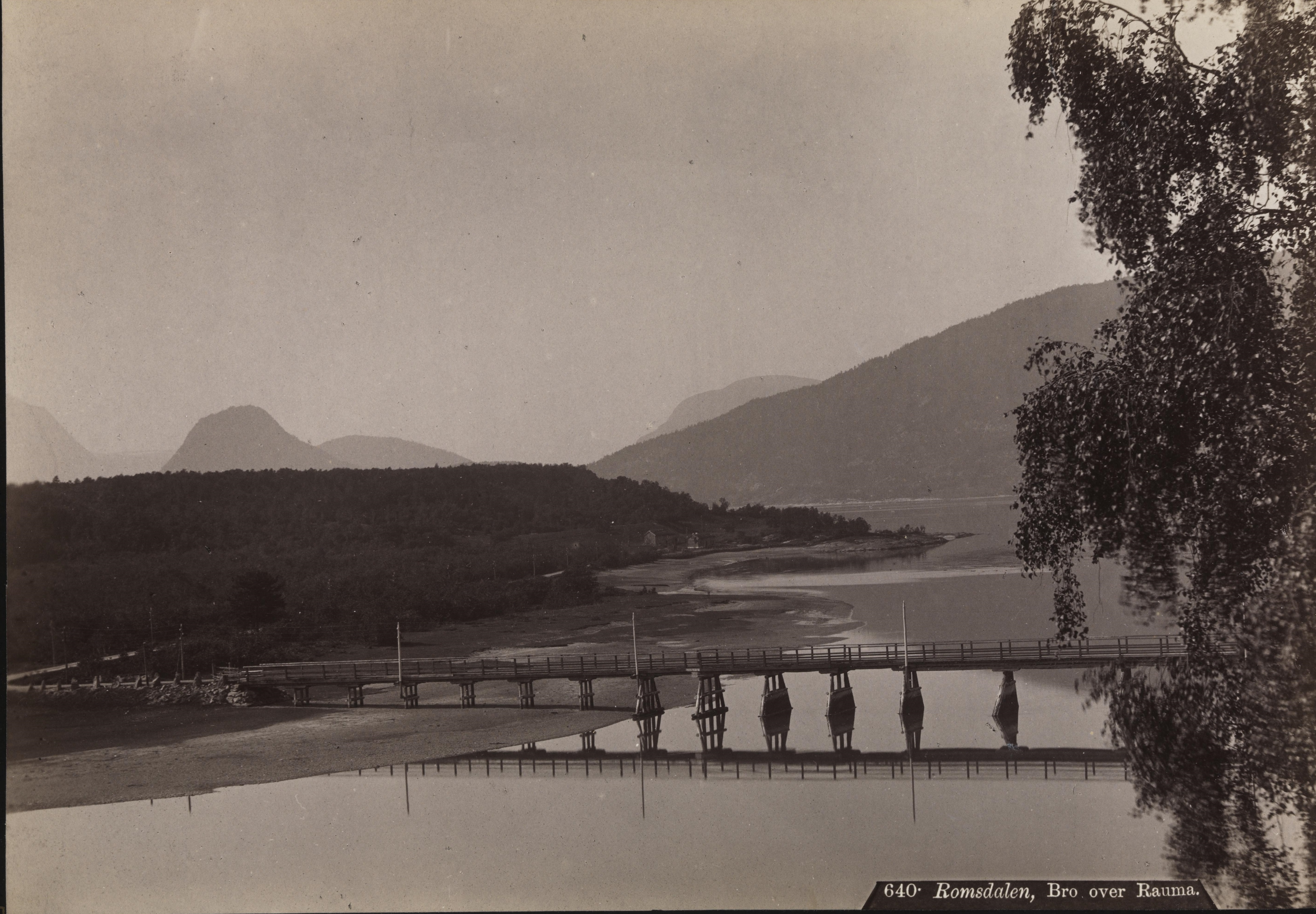 Bildet er hentet fra Nasjonalbibliotekets bildesamling Rauma, Møre og Romsdal. Beskåret for penere visning.